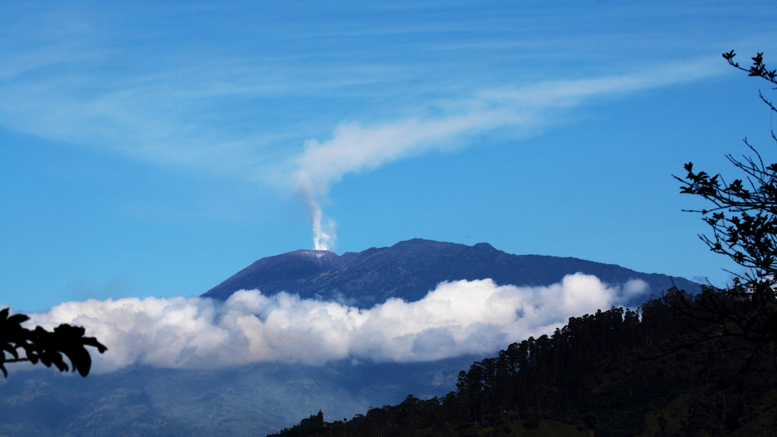 Turrialba Volcano, Costa Rica